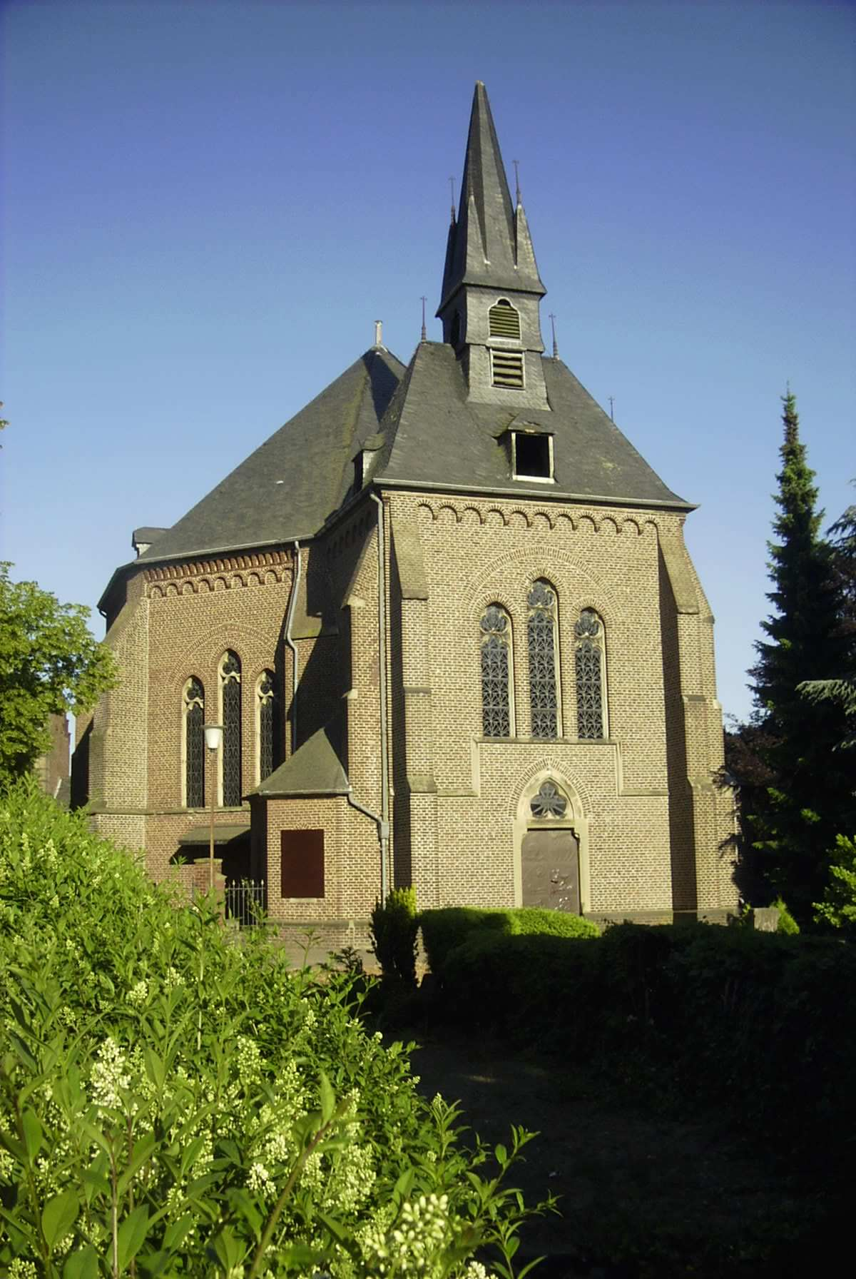 Bildbeschreibung: Otzenrath, katholische Kirche mit Oktogon und Westportal Quelle: eigenes Foto Fotograf/Zeichner: bodoklecksel 21:39, 12. Jun 2006 (CEST) Datum: Juni 2006 Sonstiges